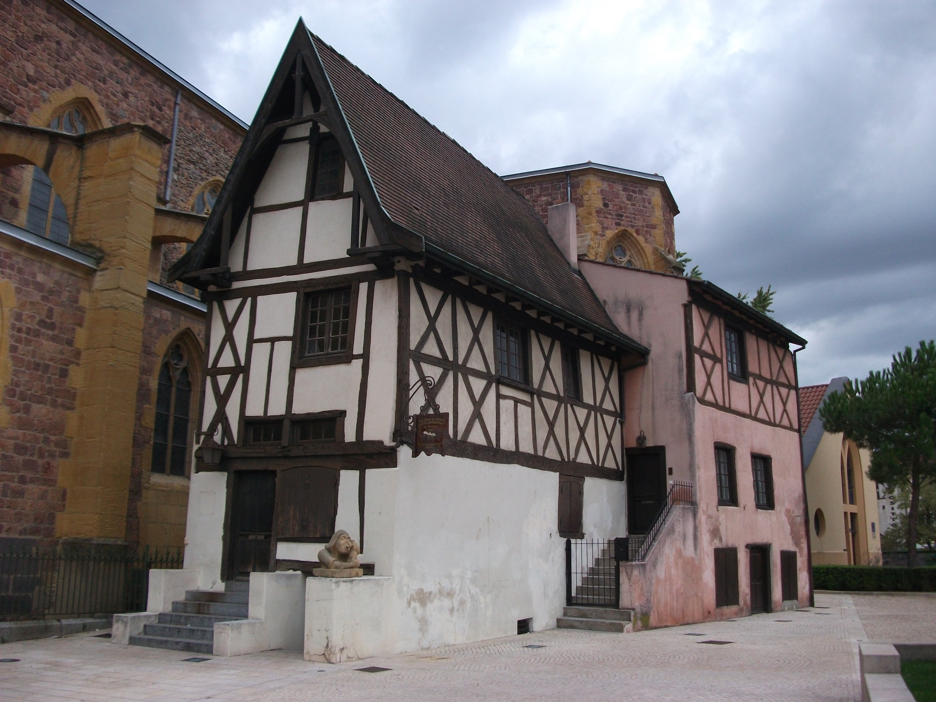 Maison à pans de bois, La Ville2 rue Jean-Baptiste-Salle (Inscrit, 1949) .